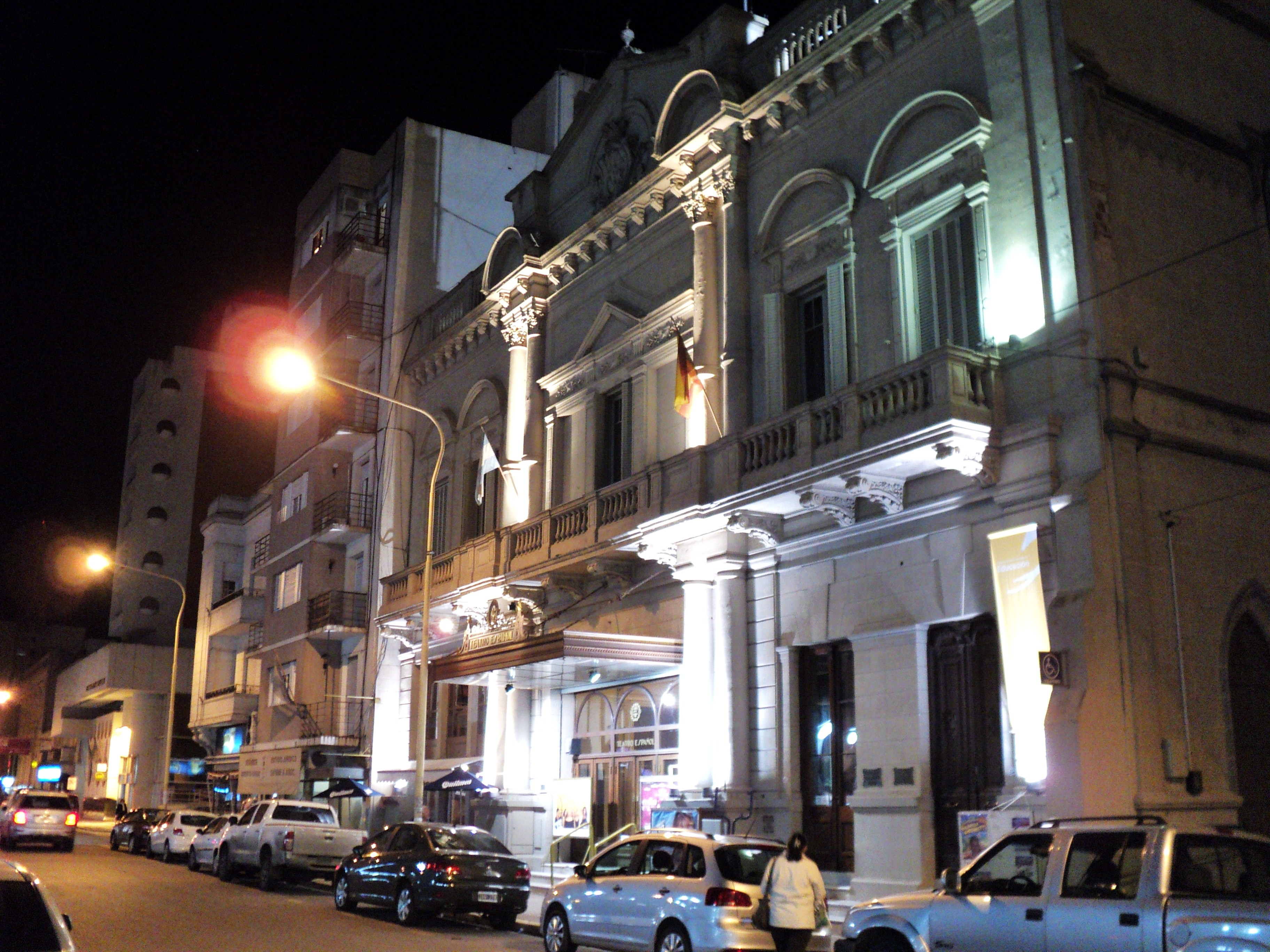 Teatro Español y Calle San Martín. Azul, Prov. de Buenos Aires.